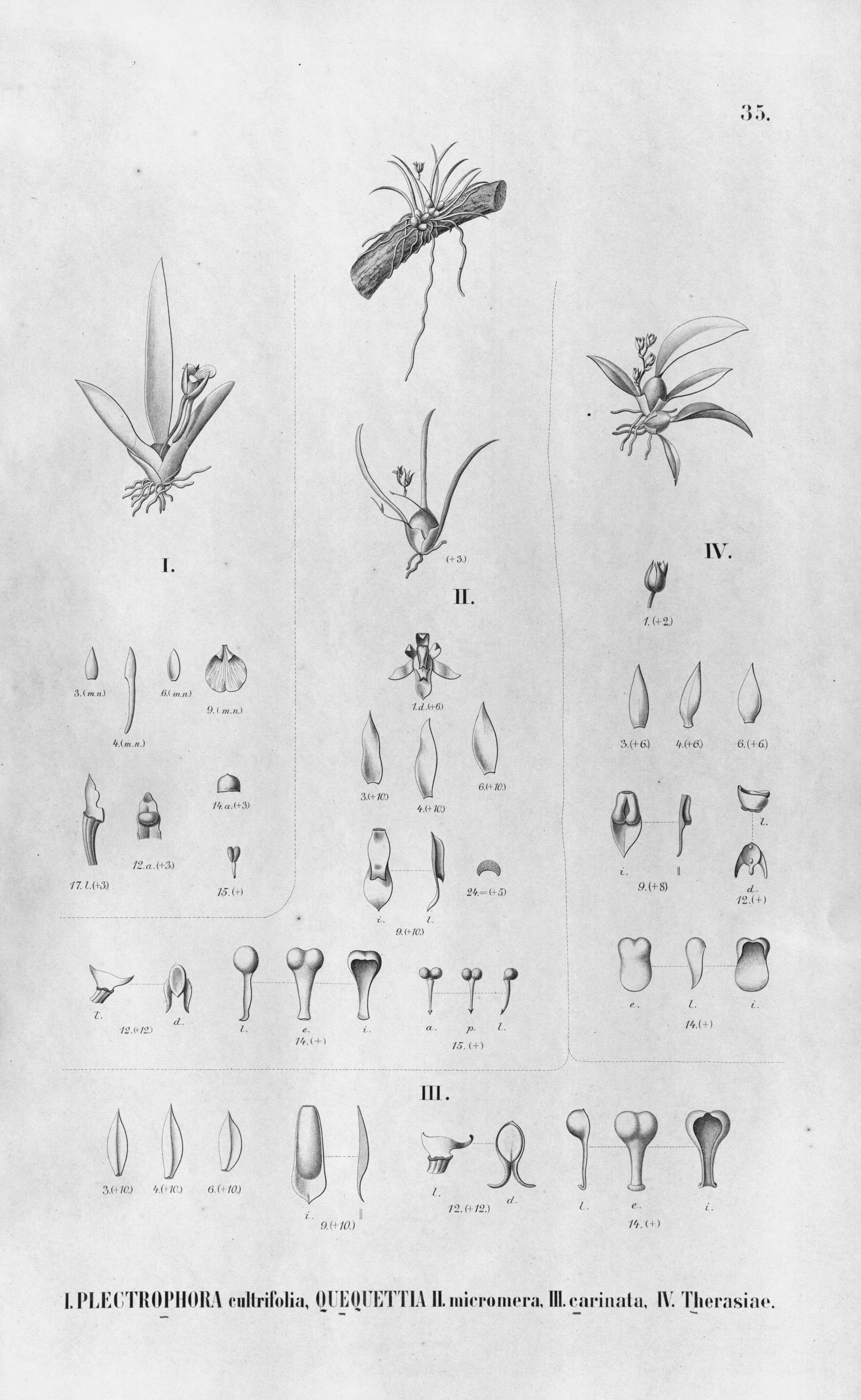 Illustration of: I. Plectrophora cultrifolia II. Capanemia micromera (as Quequettia micromera) III. Capanemia carinata (as Quequettia carinata) IV. Capanemia theresae (as Quequettia theresae)